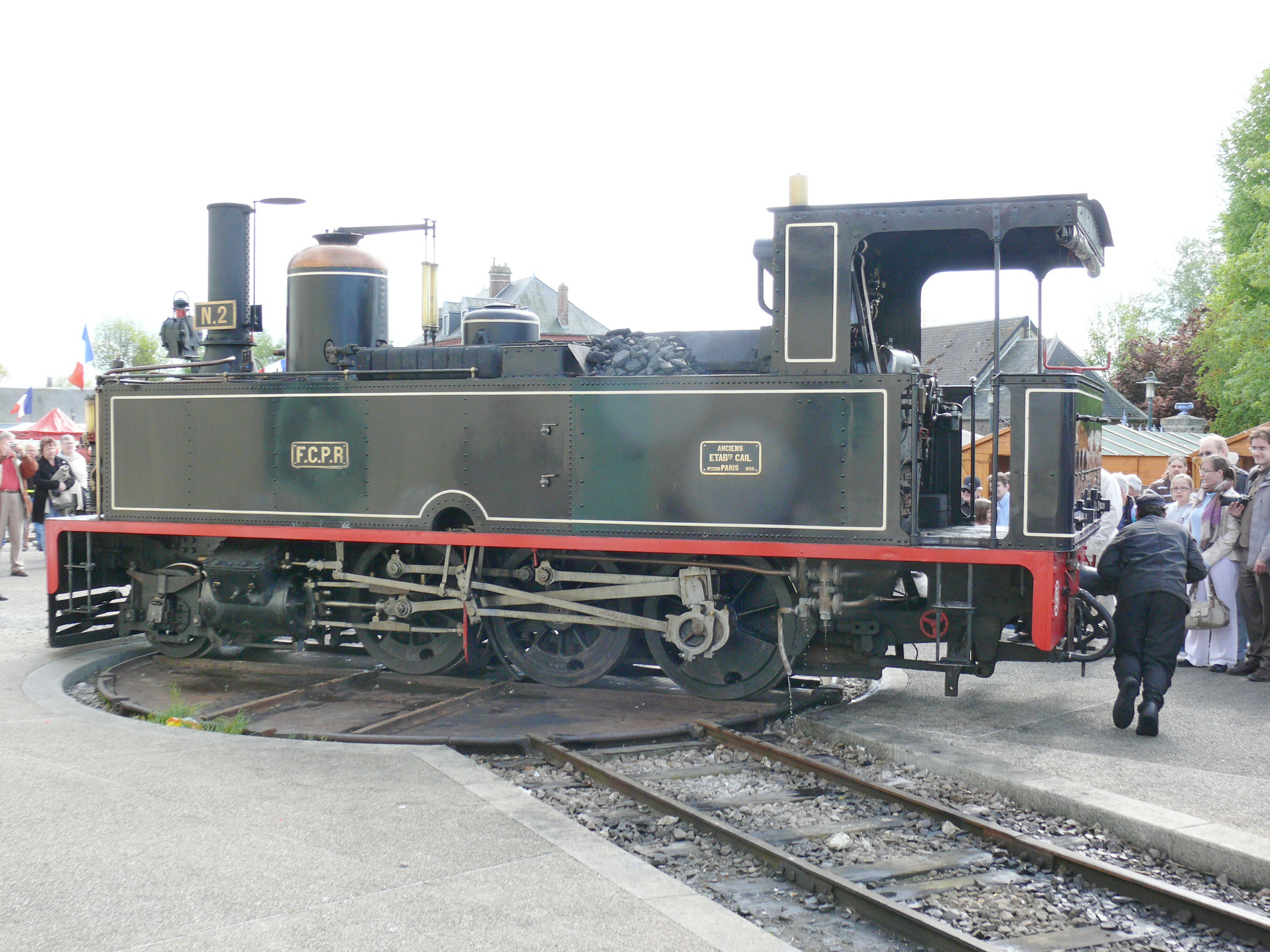 Locomotive à voie métrique 130T Cail N°2 de 1889, vue sur la plaque tournante de la gare de Noyelles, sur le Chemin de fer de la baie de Somme